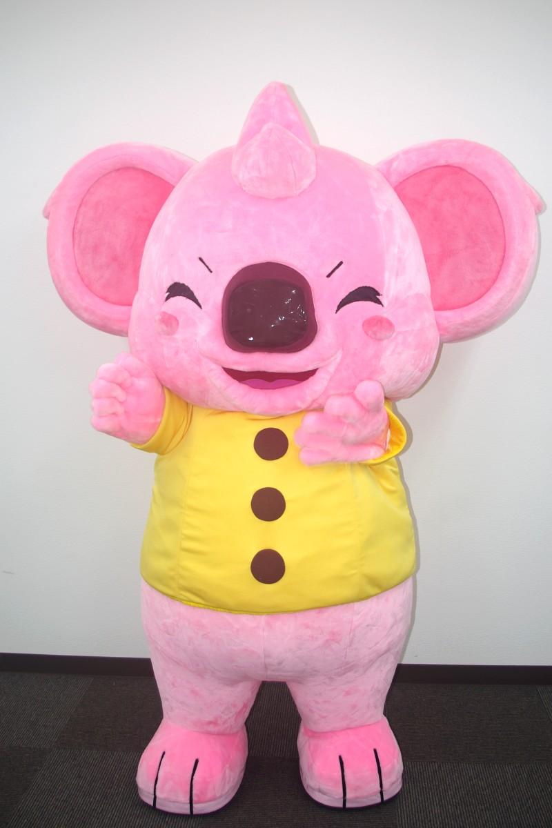 シアリンの写真